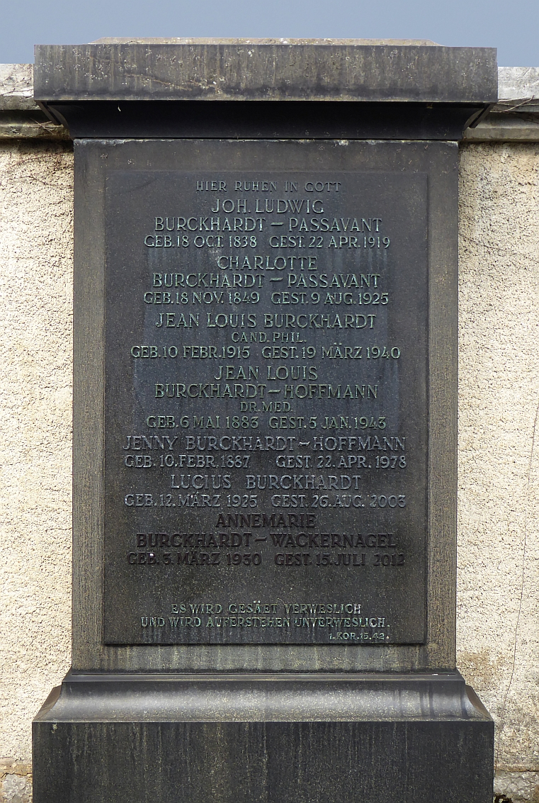 Lucius Burckhardt (1925–2003), Soziologe, Nationalökonom, Dozent, Mitbegründer der «Grüne Alternative Basel». Grab auf dem Friedhof Wolfgottesacker, Basel